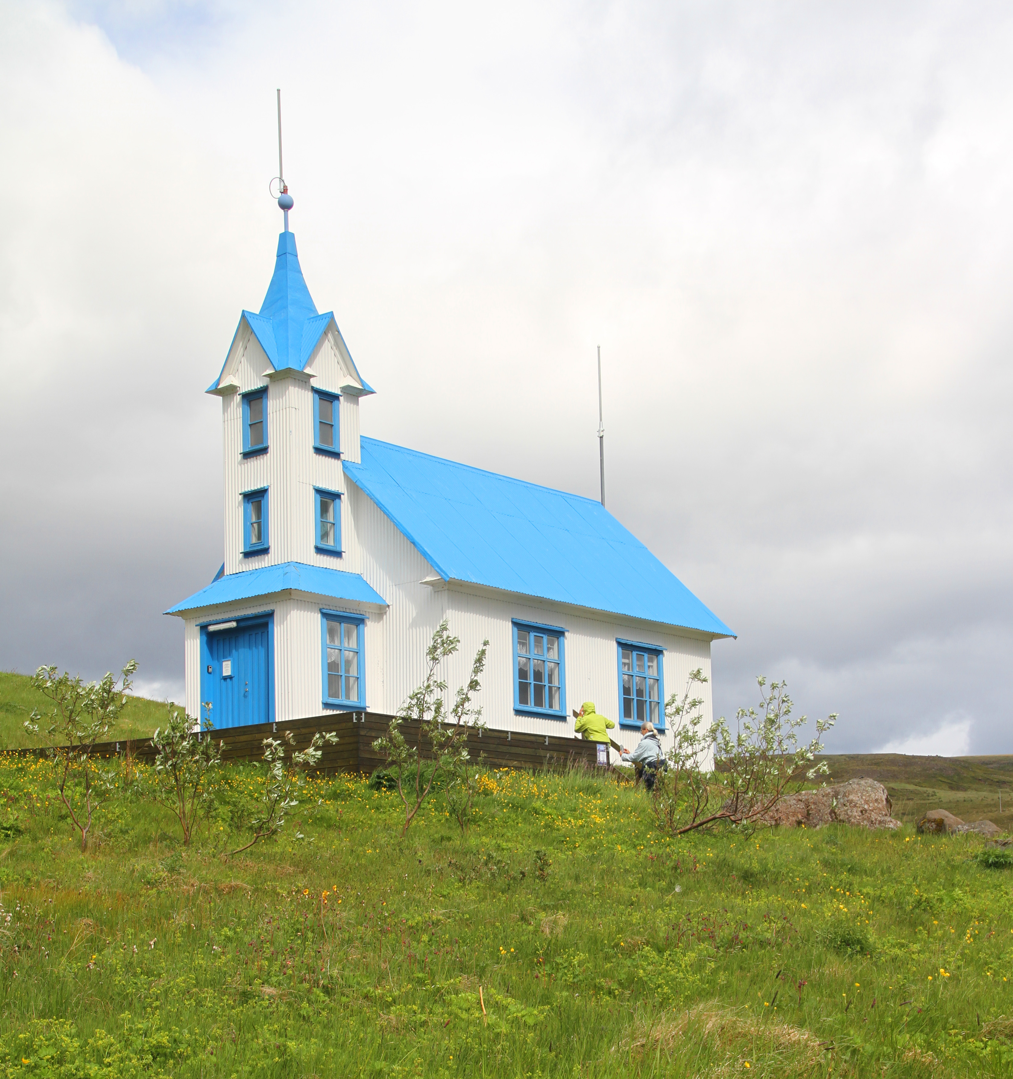 Stöðvarfjörður